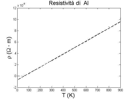 Tratto da L. A. Hall, SURVEY OF ELECTRICAL. RESISTIVITY. MEASUREMENTS. ON 16 PURE METALS. IN THE. TEMPERATURE. RANGE 0 TO 273°K NBS Techincal Note 365 1968